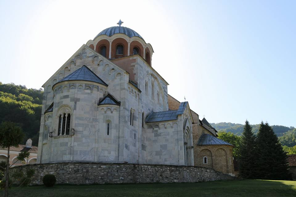 Српски (ћирилица): Богородичина црква је изузетно сложен грађевински подухват у коме су на уметнички начин сједињени утицаји Истока и Запада